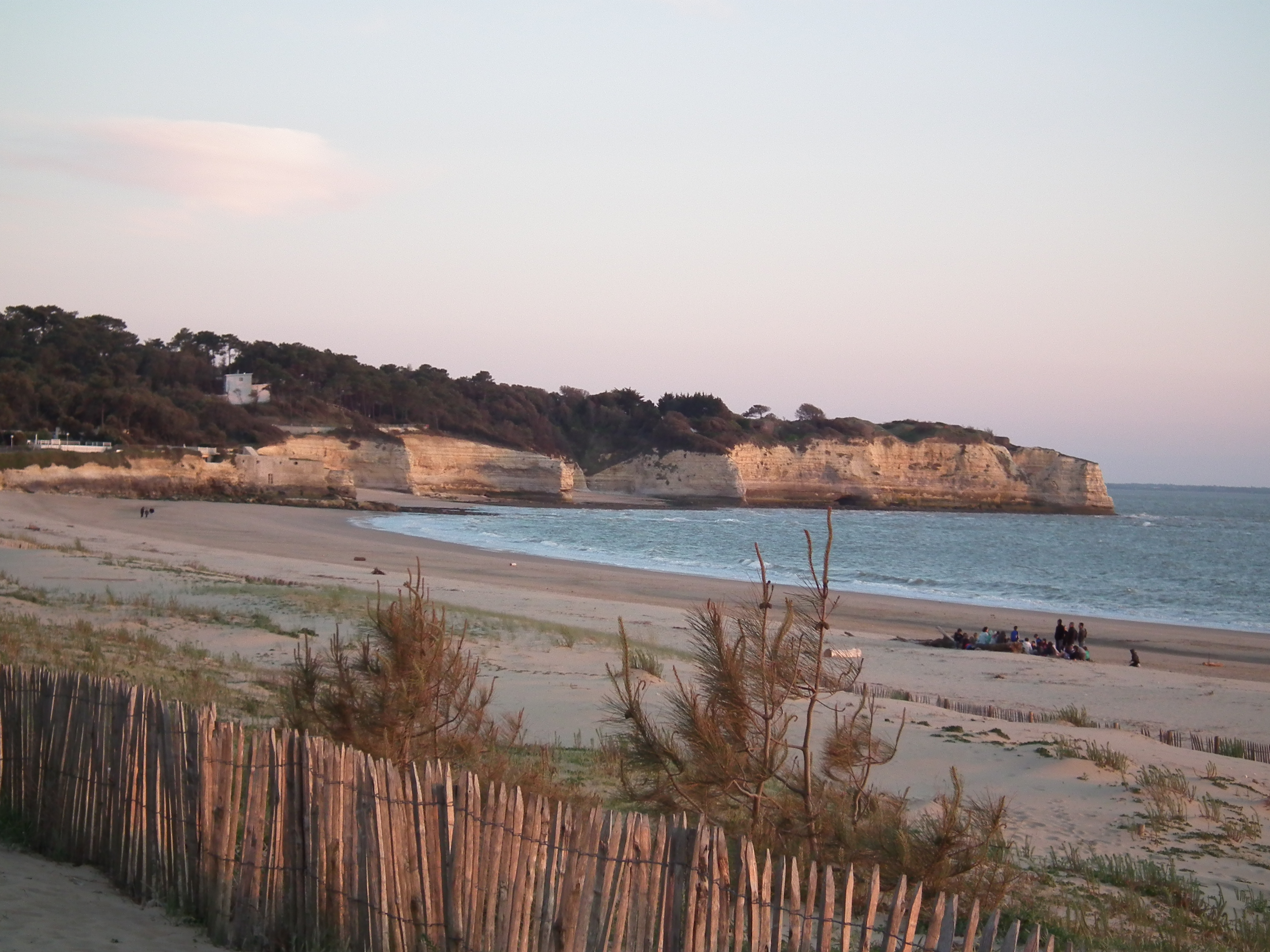 Plage de Saint-Georges-de-Didonne au coucher du soleil, vue vers Suzac